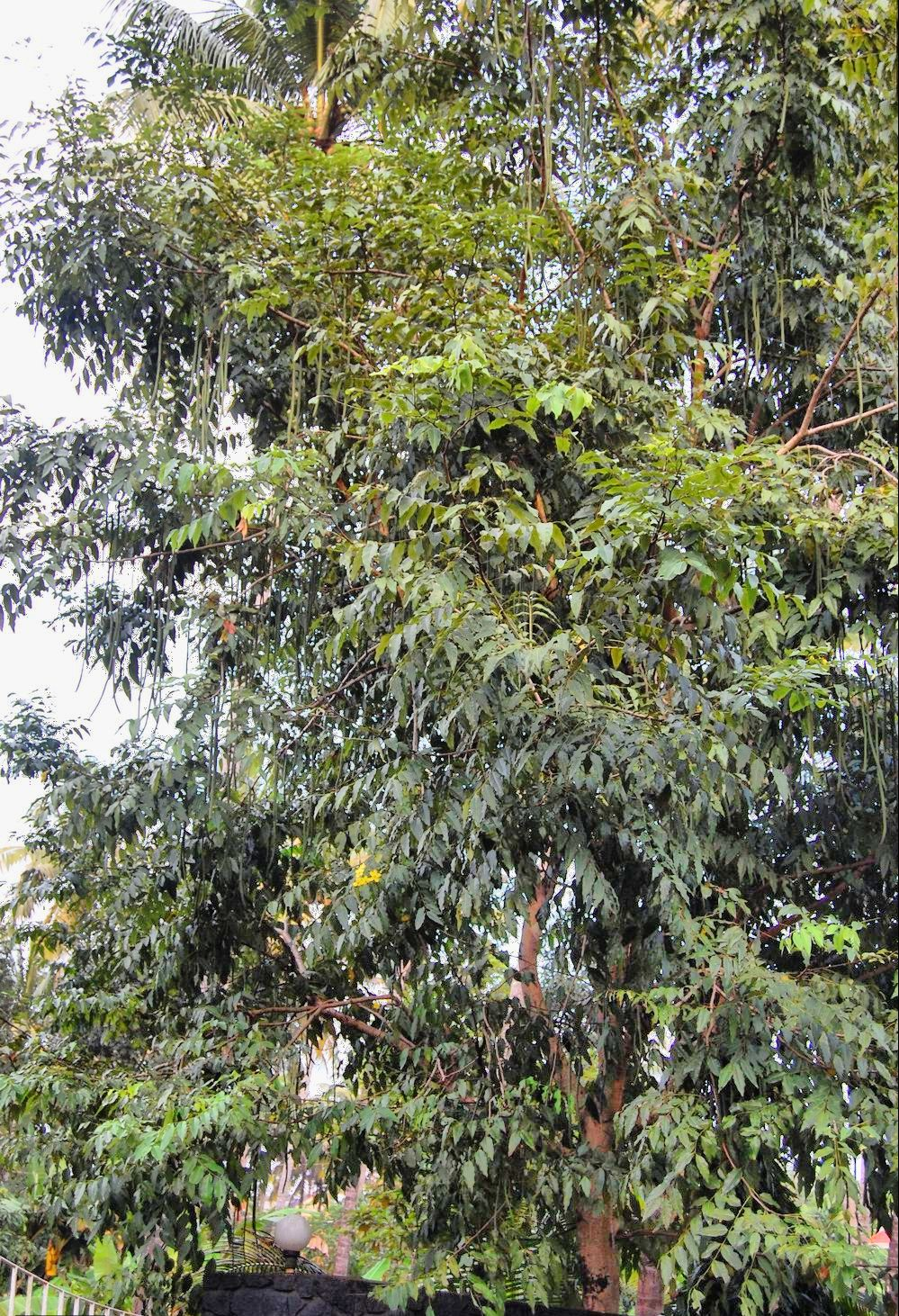 കണിക്കൊന്നമരം